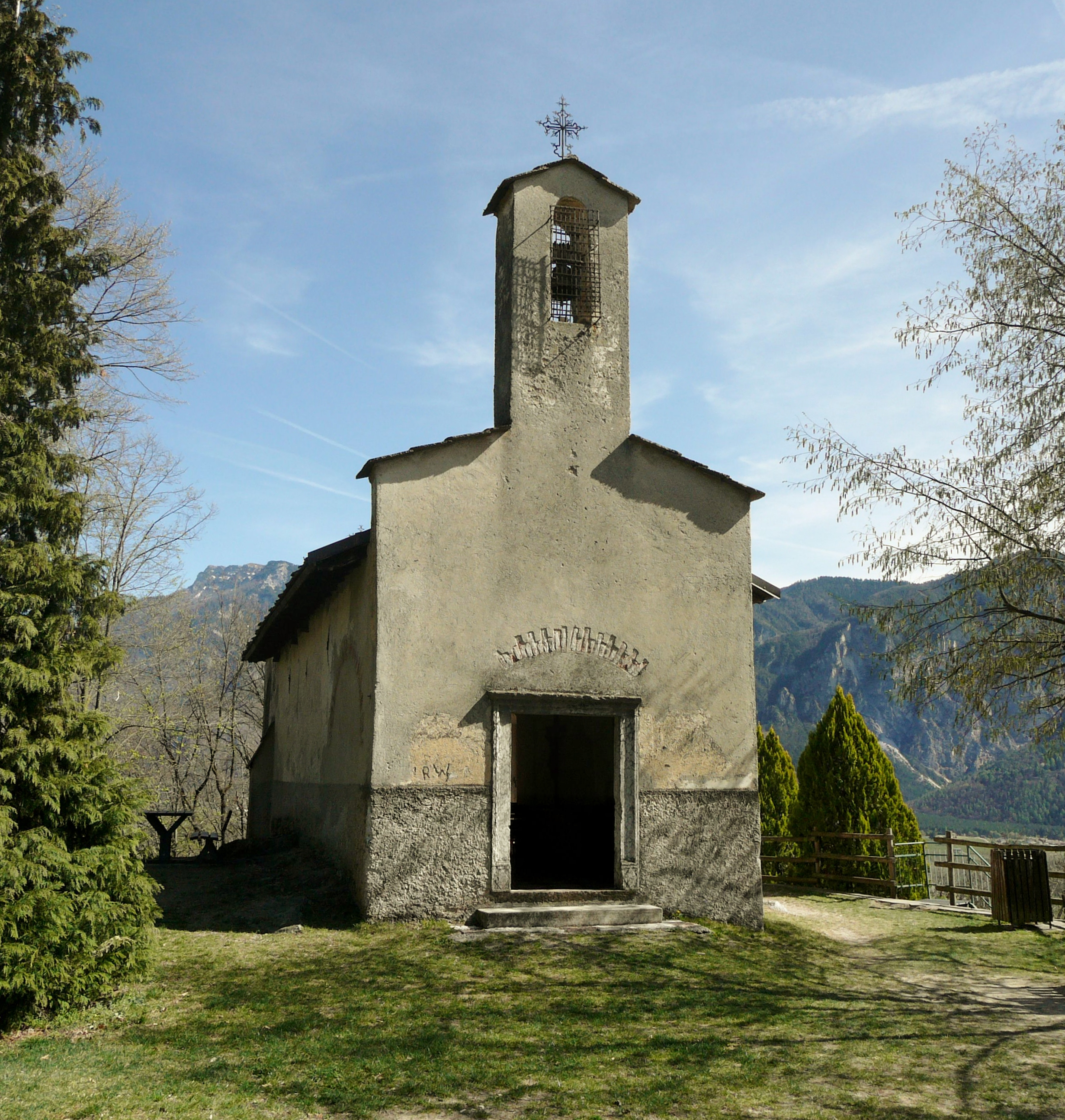 Chiesa San Valentino, tra il lago di Levico e quello di Caldonazzo in Trentino